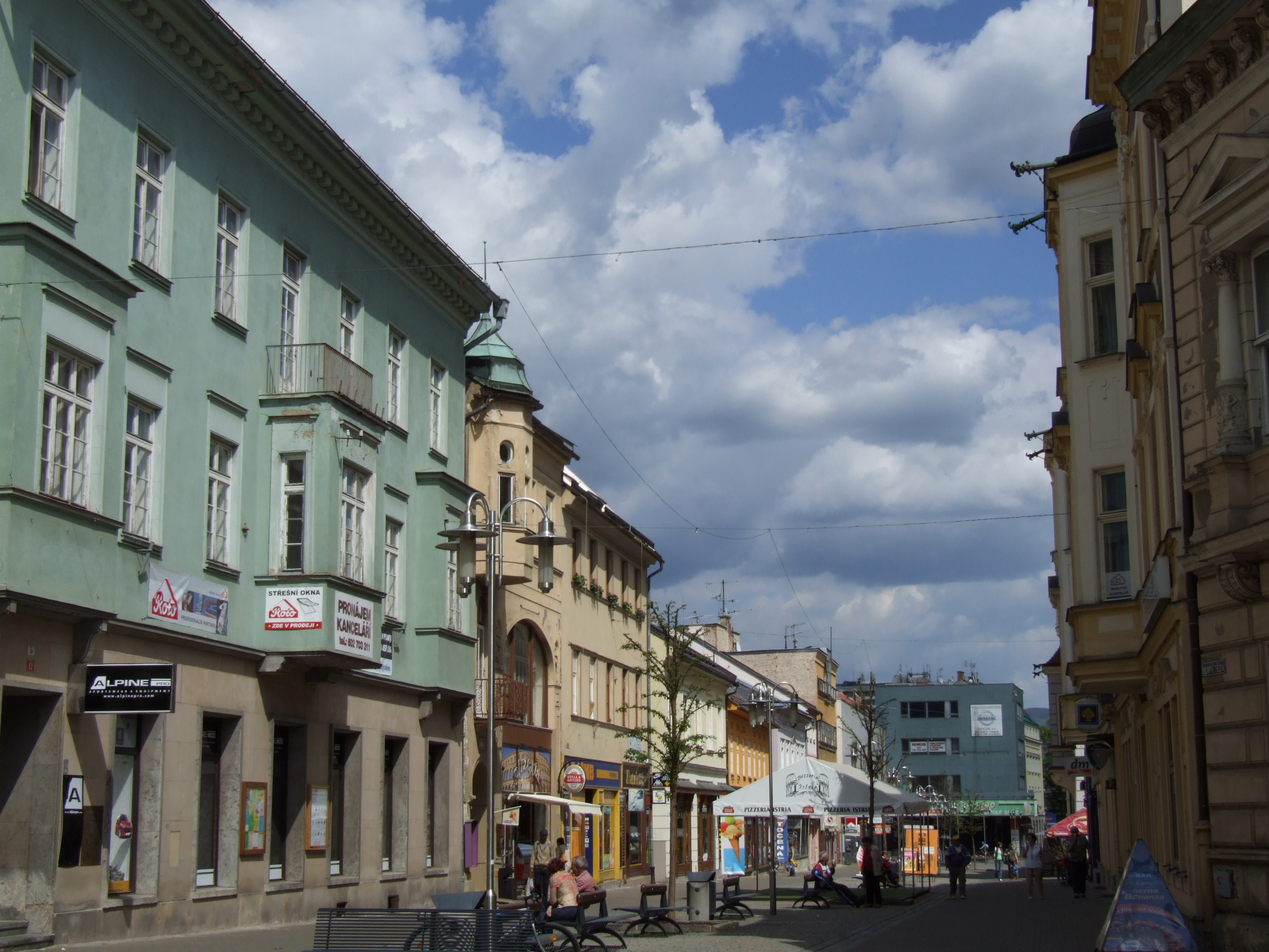 Šumperk (Mährisch Schönberg) - Hlavní třída